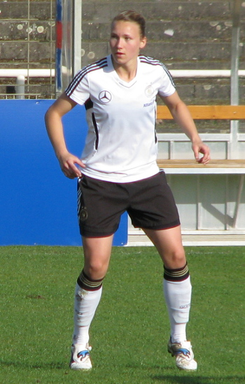 Josephine Henning